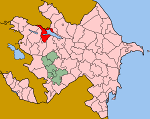 Map of Azerbaijan showing Samukh (Samux) rayon.